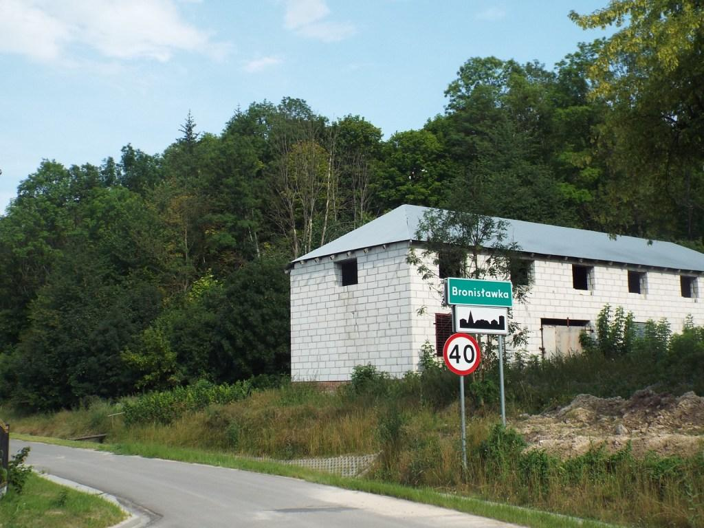 Bronisławka - wieś w powiecie zamojskim